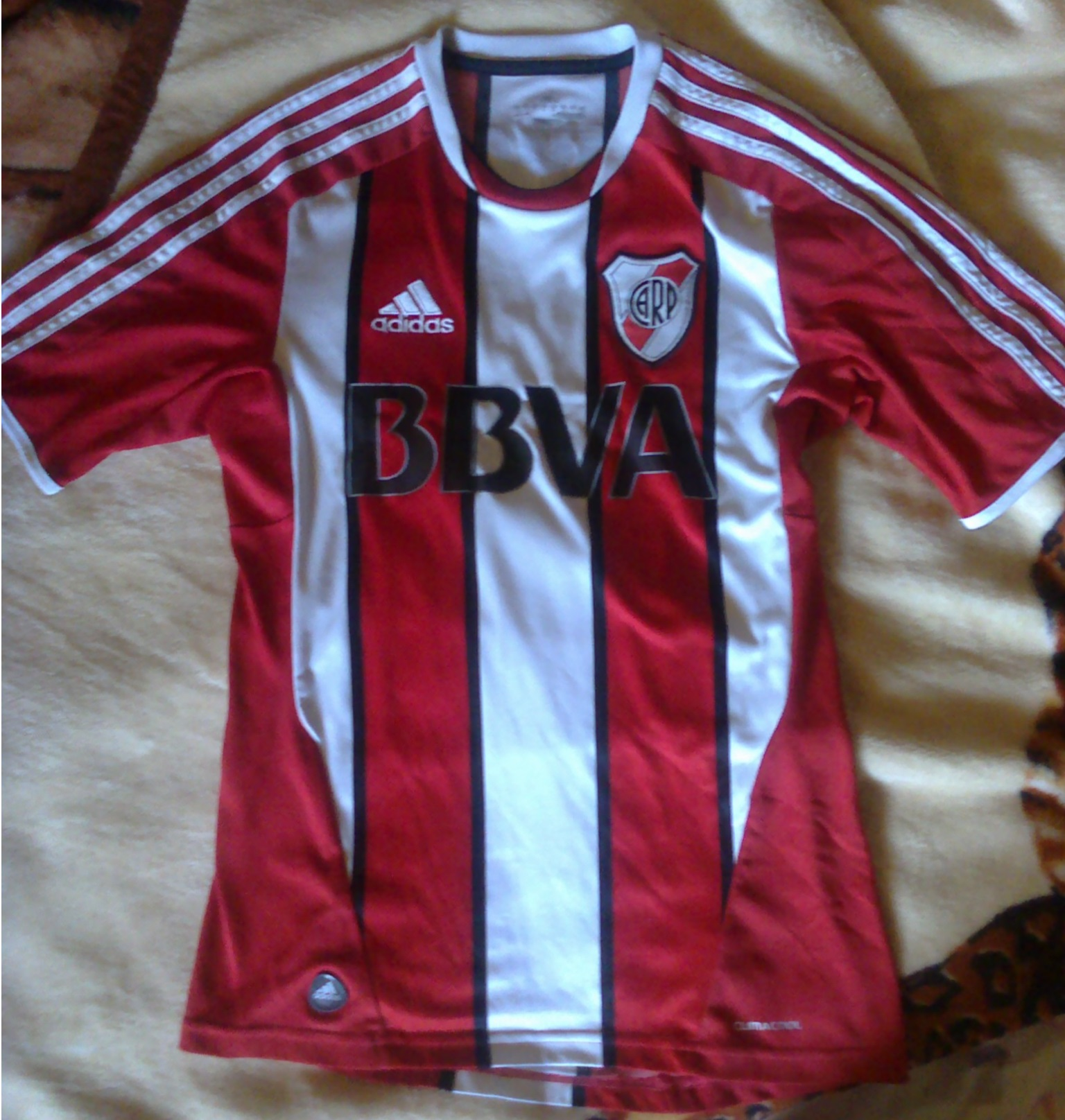 Camiseta alternativa Adidas tecnología ClimaCool utilizada por River Plate para la temporada 2011/12.